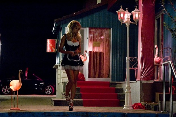 Pressefoto "Little Paris"